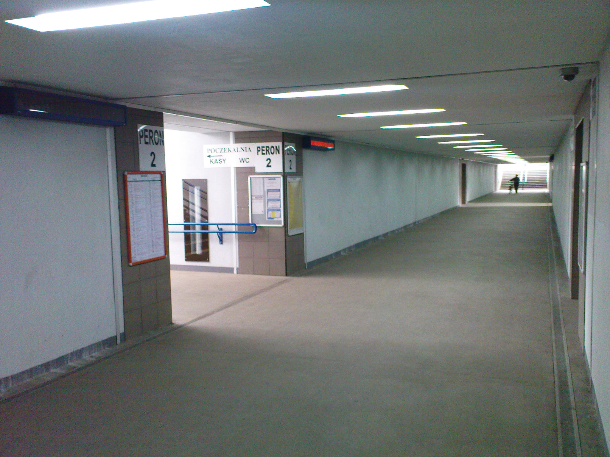 przejscie pkp koluszki